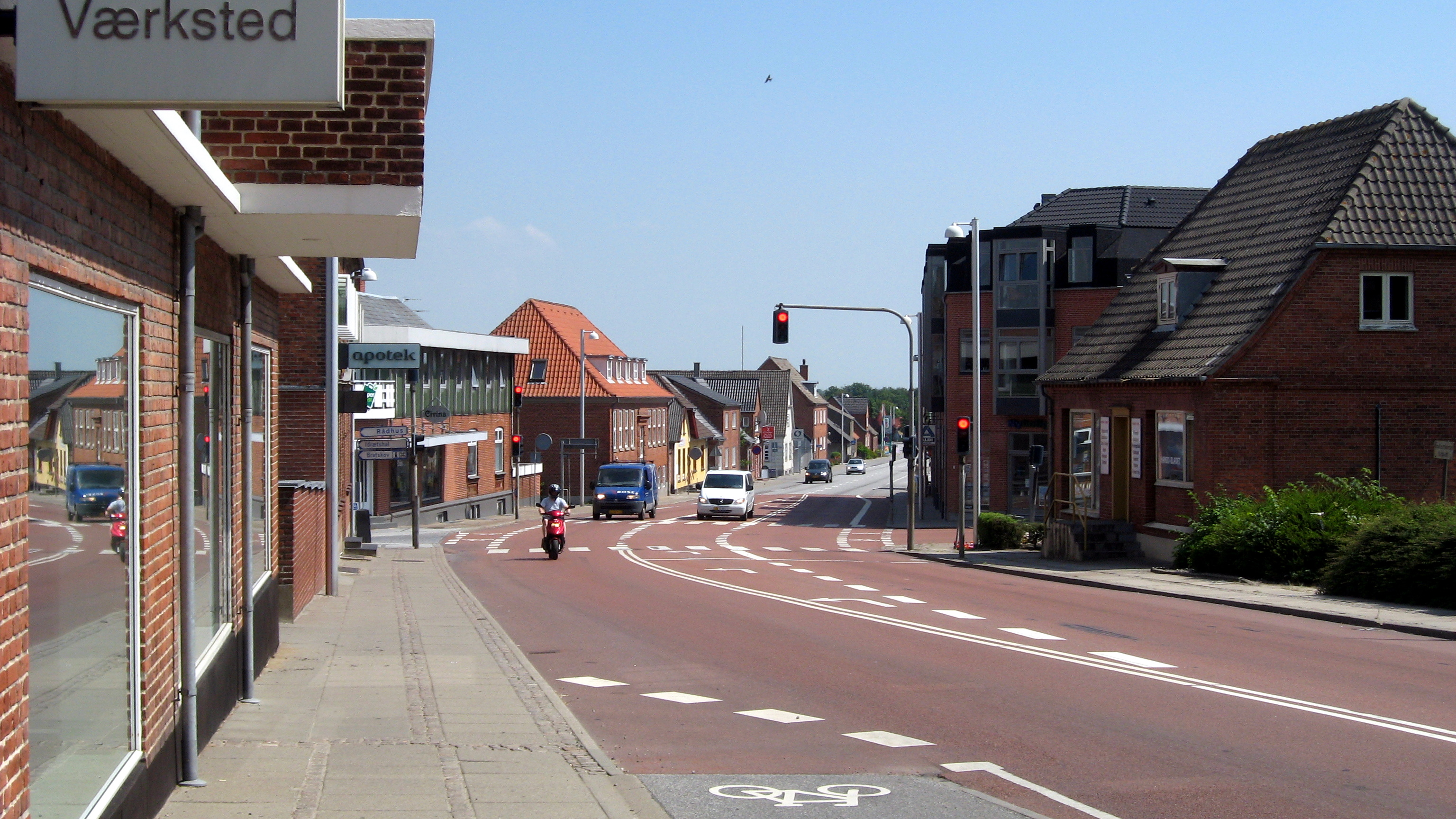 Brovst